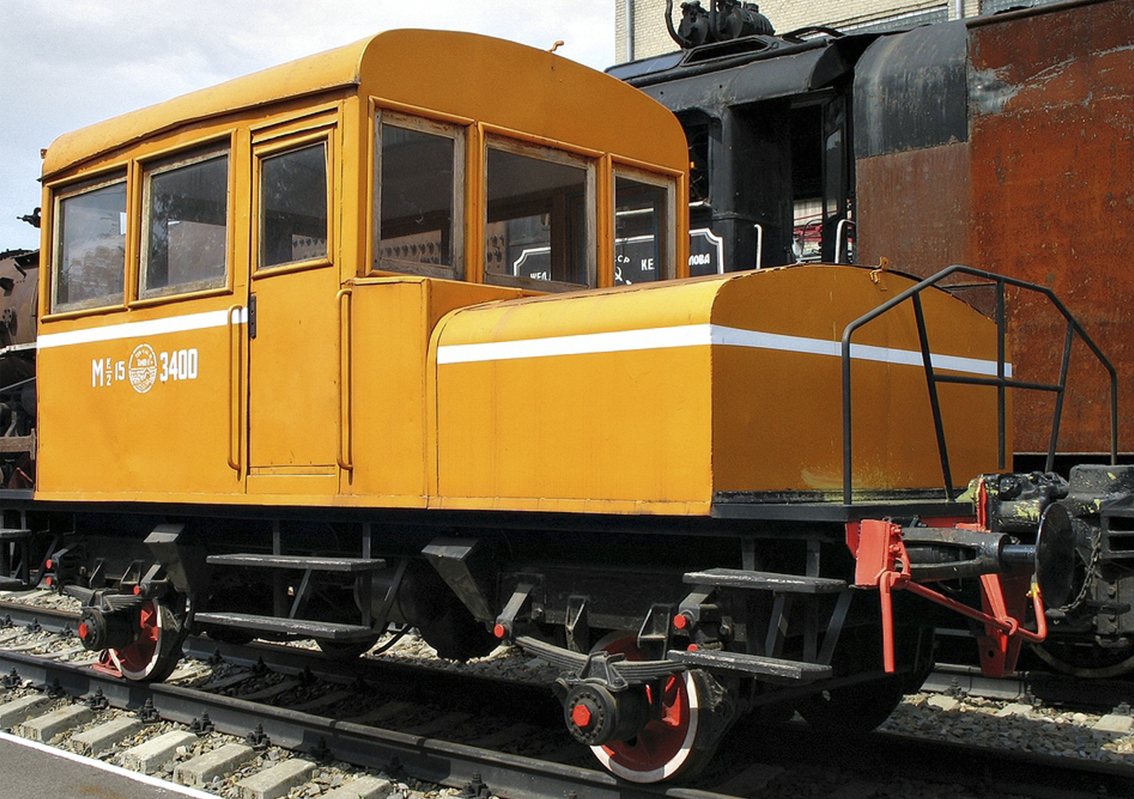 Мотовоз построен Калужским машиностроительным заводом в 1954 году